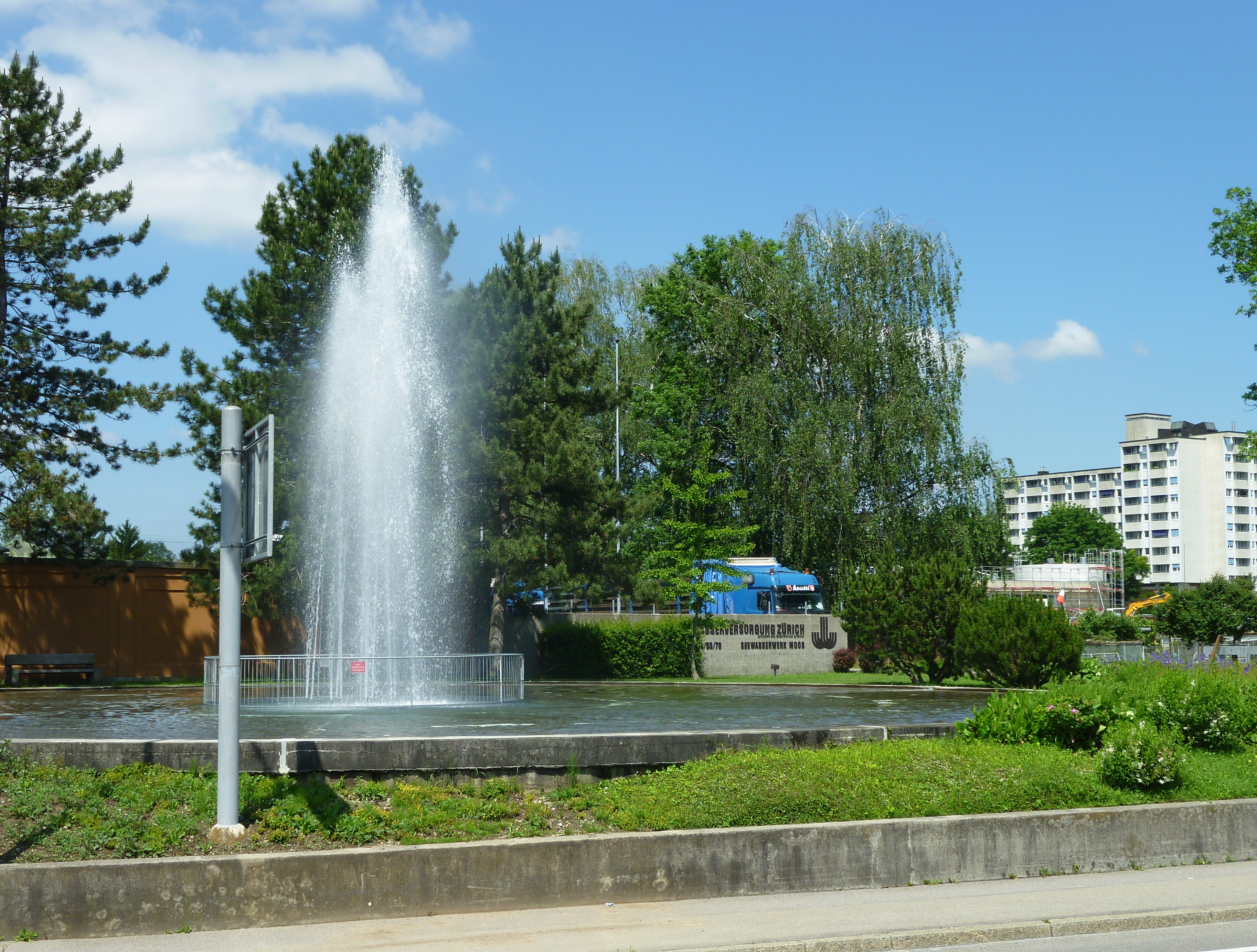 Seewasserwerk Moos, Zürich Wollishofen